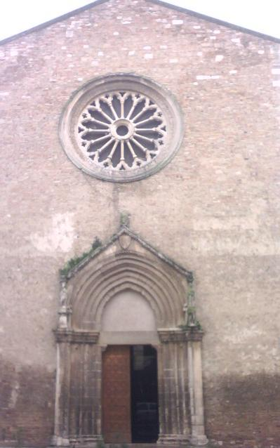 Simone De Troia, Santuario di San Francesco Antonio Fasani. Licensing Categoria:Lucera